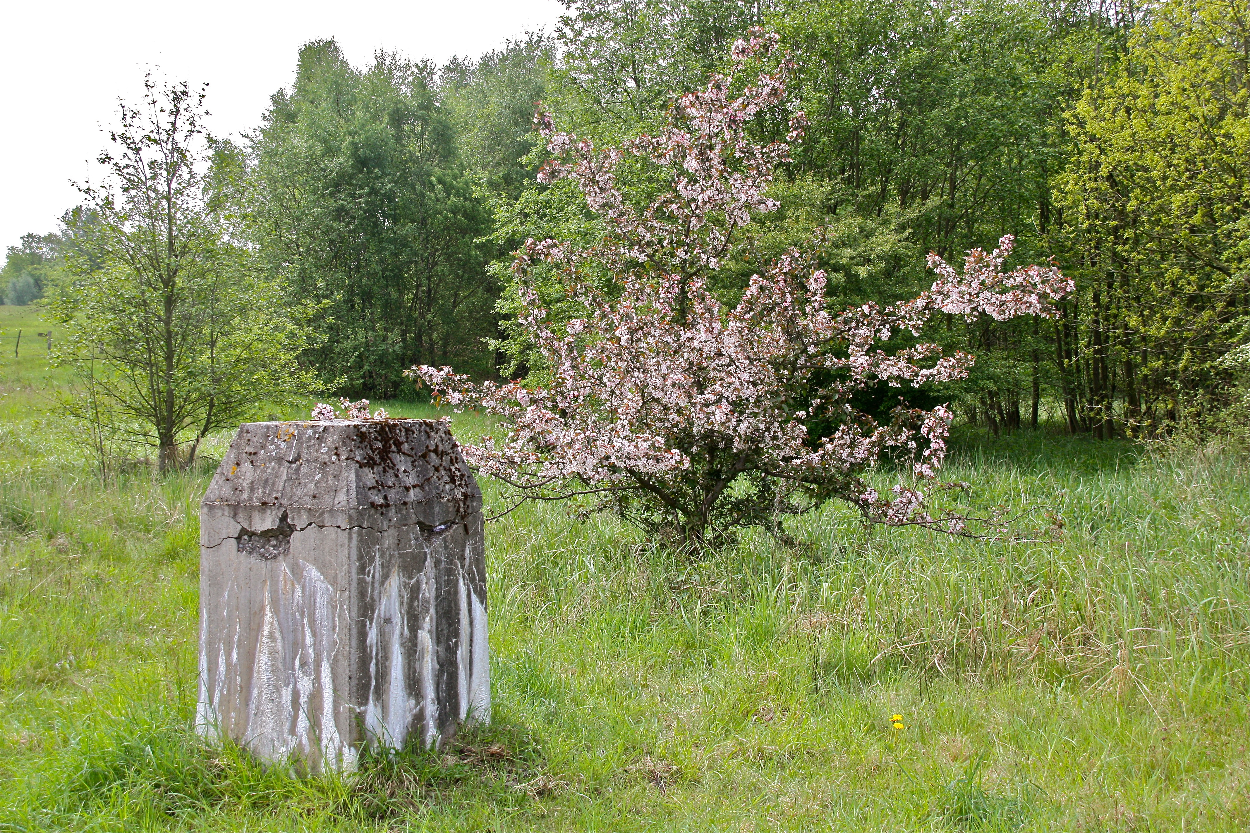 Hamburg, Rahlstedt, Naturschutzgebiet Höltigbaum, Obstbaum mit Rest einer Panzerstrasse